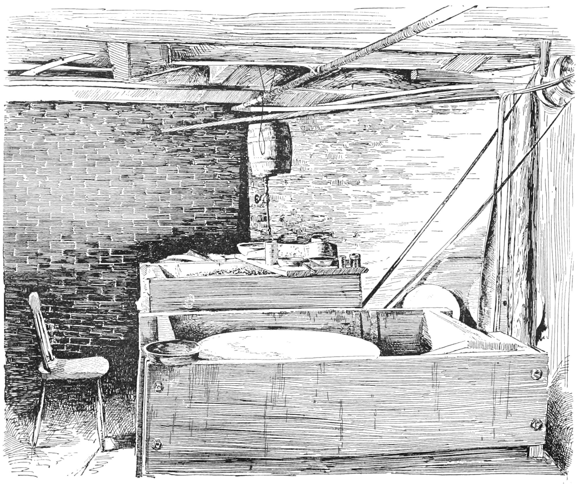 Grinding telescope lenses